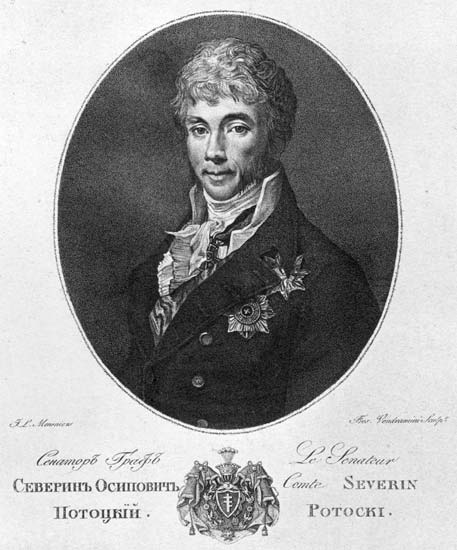 Потоцкий Северин Осипович (граф)